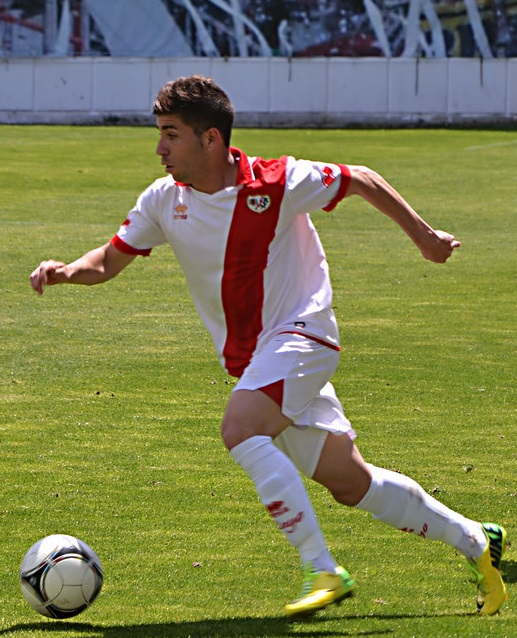 Jugador del Rayo Vallecano, Adrián Embarba.